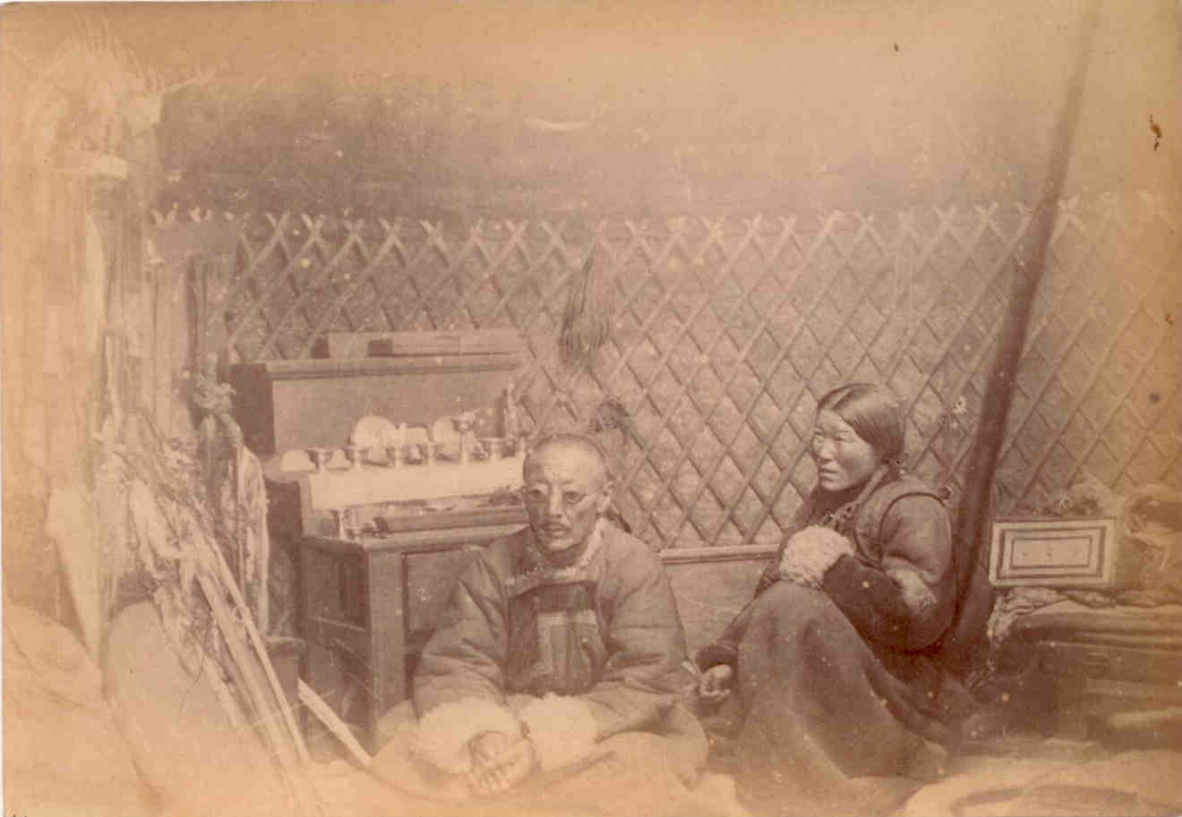 Intérieur de la yourte d'un chaman (le chaman toungouse dont figure la photographie dans cette série de vues sibériennes ?)